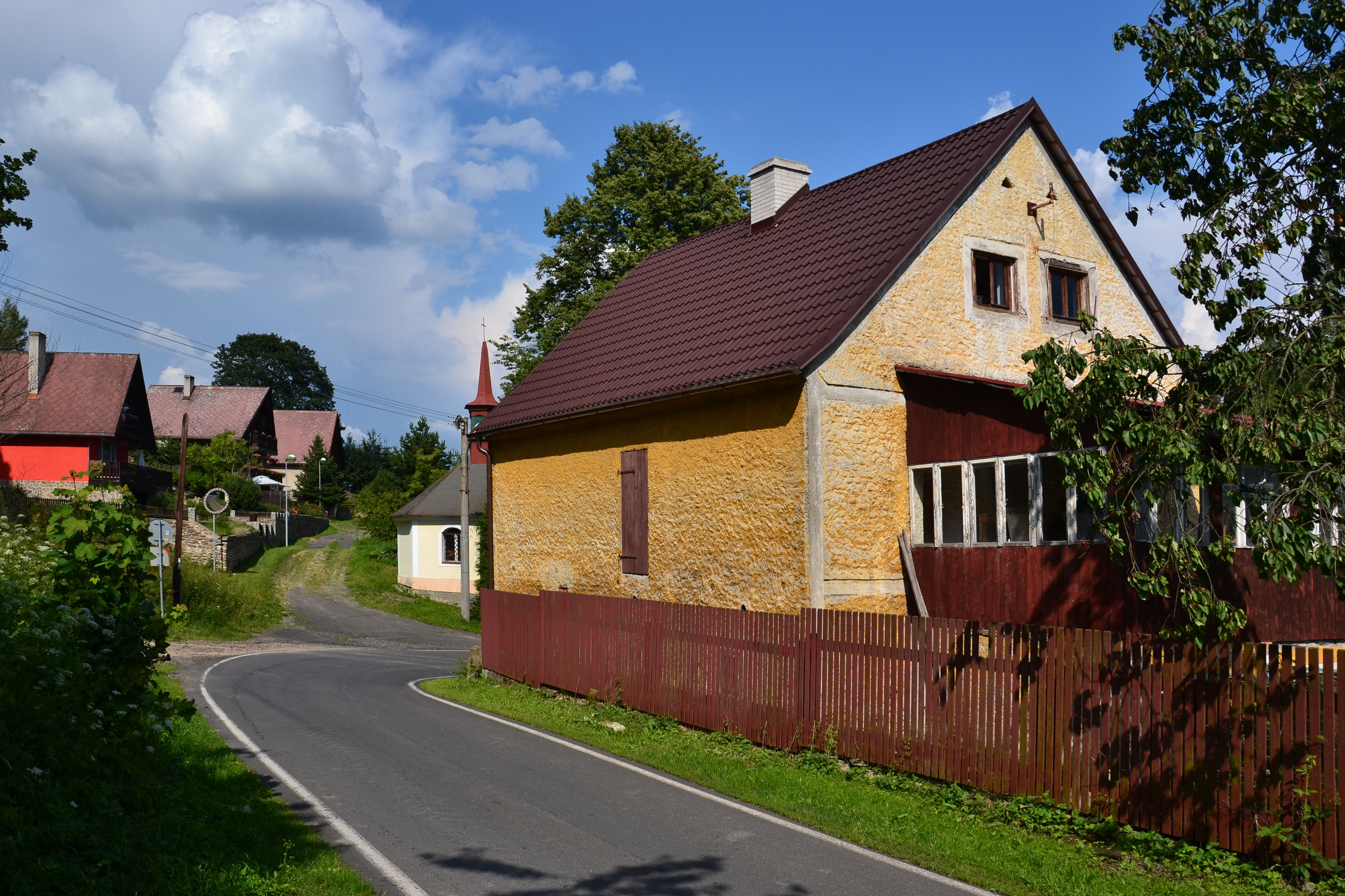 Lideň - dům čp. 42